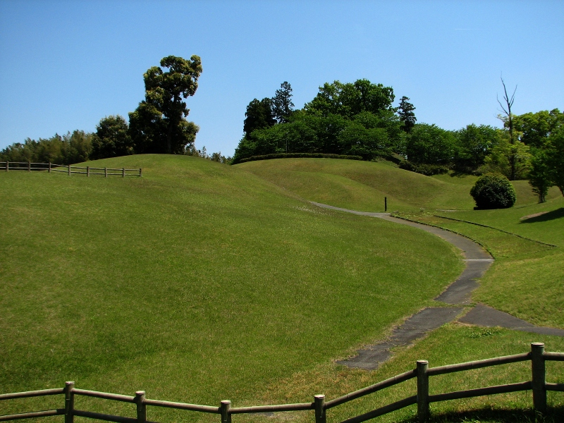 Takaba castle in Goshi, Kumamoto, Japan